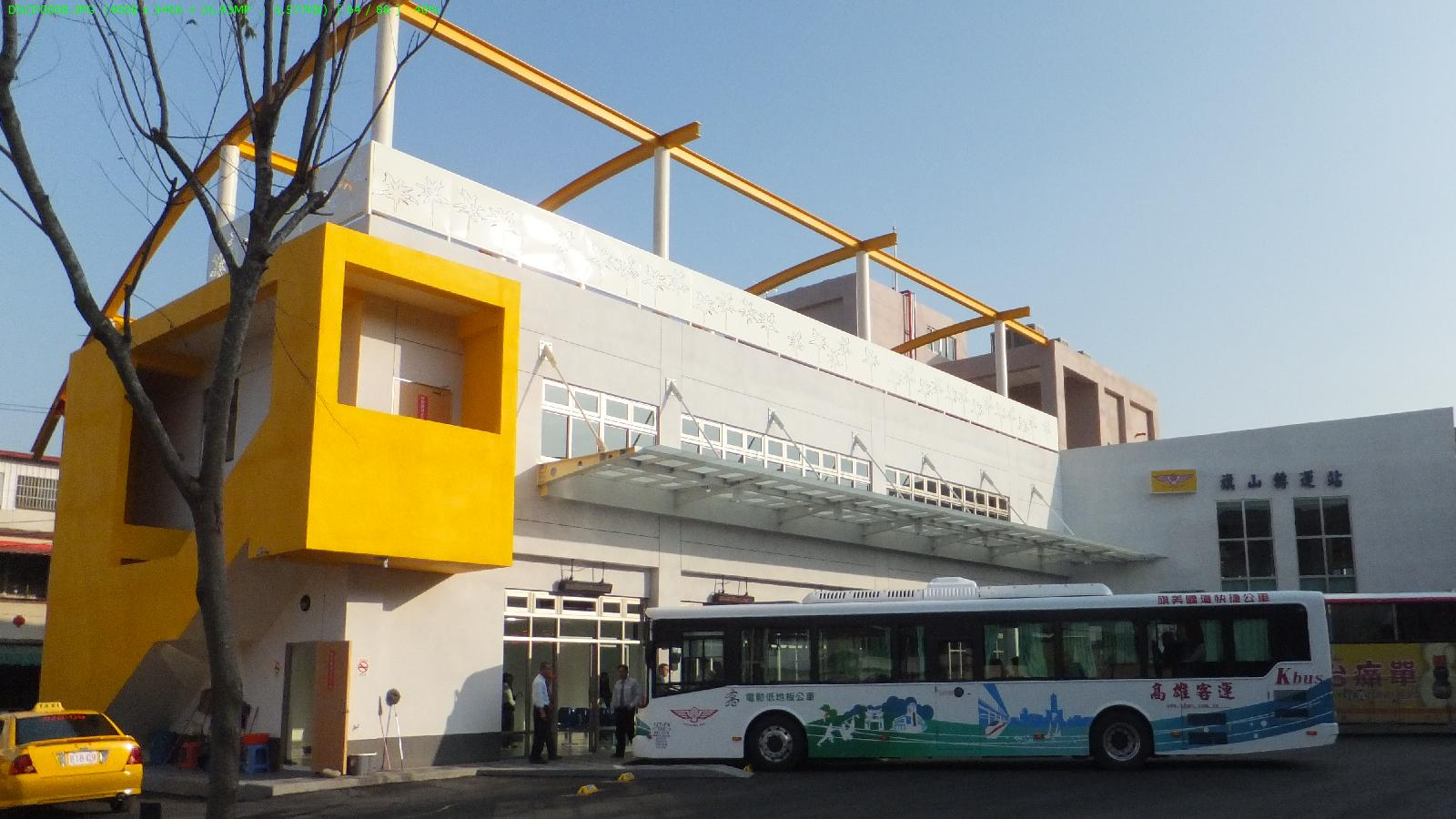 高雄客運電動低地板公車127-FV停靠旗山轉運站。